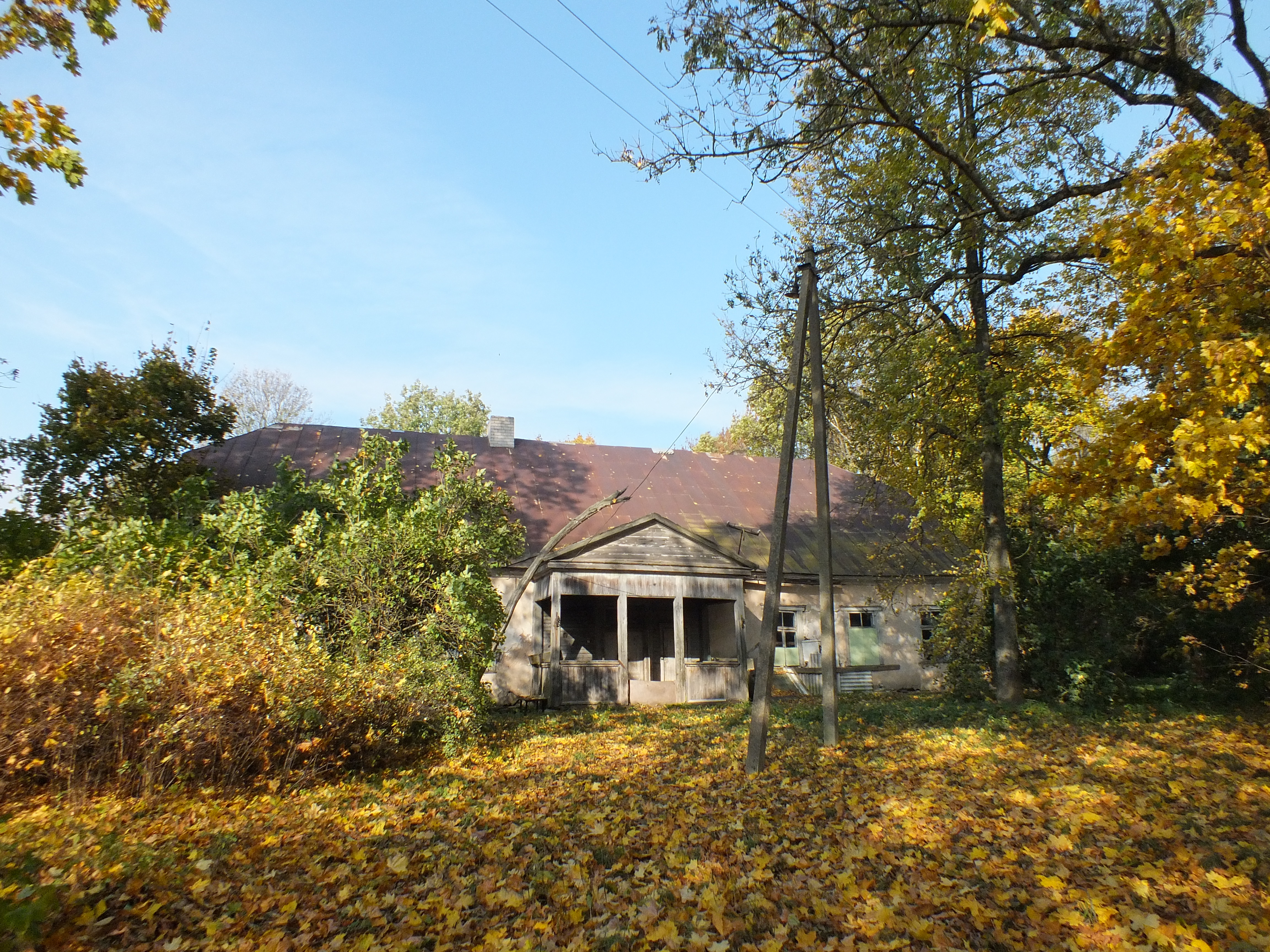 Mikailiškių dvaro rūmai